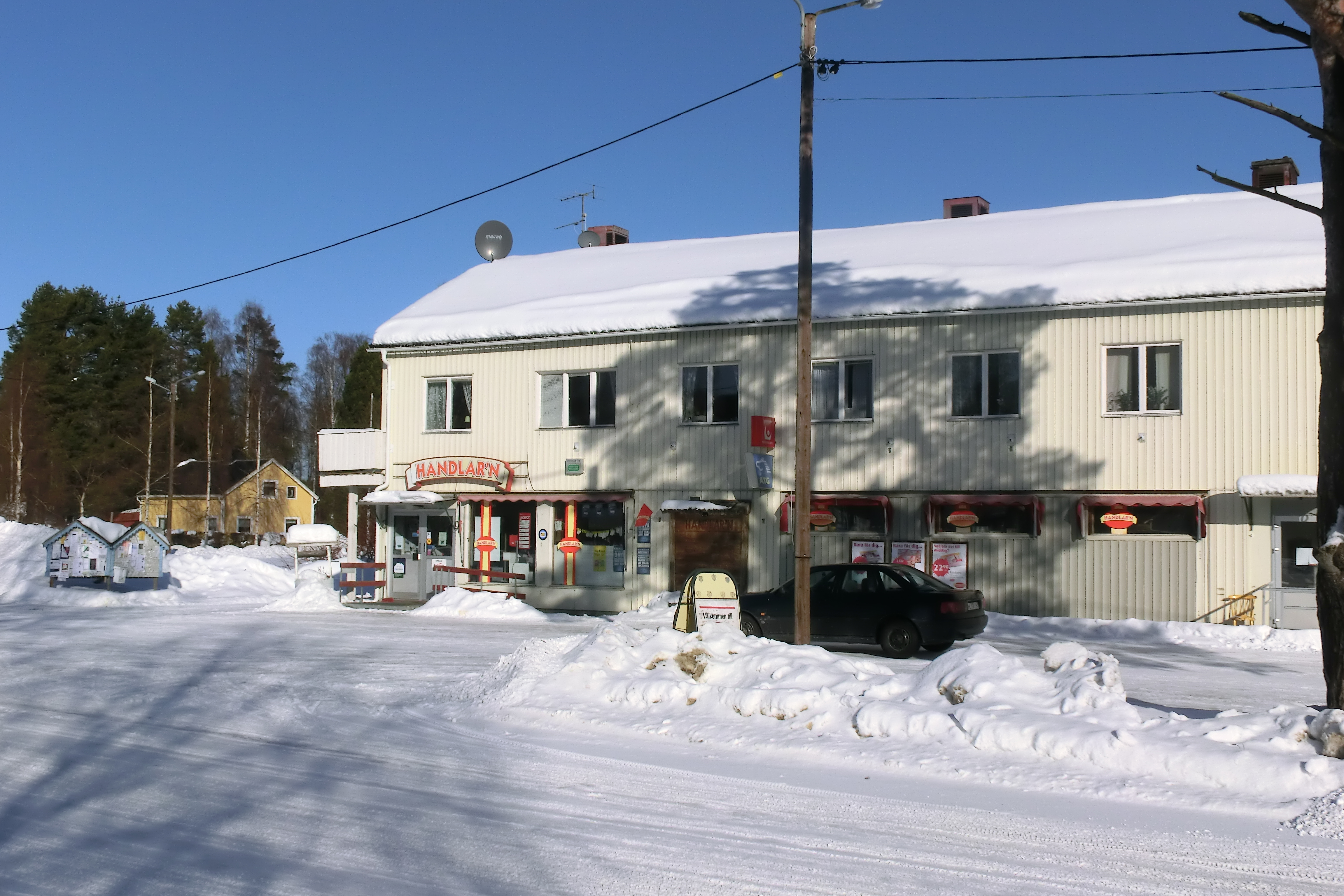 Handlarn i Undrom. Länsväg 334 i förgrunden.